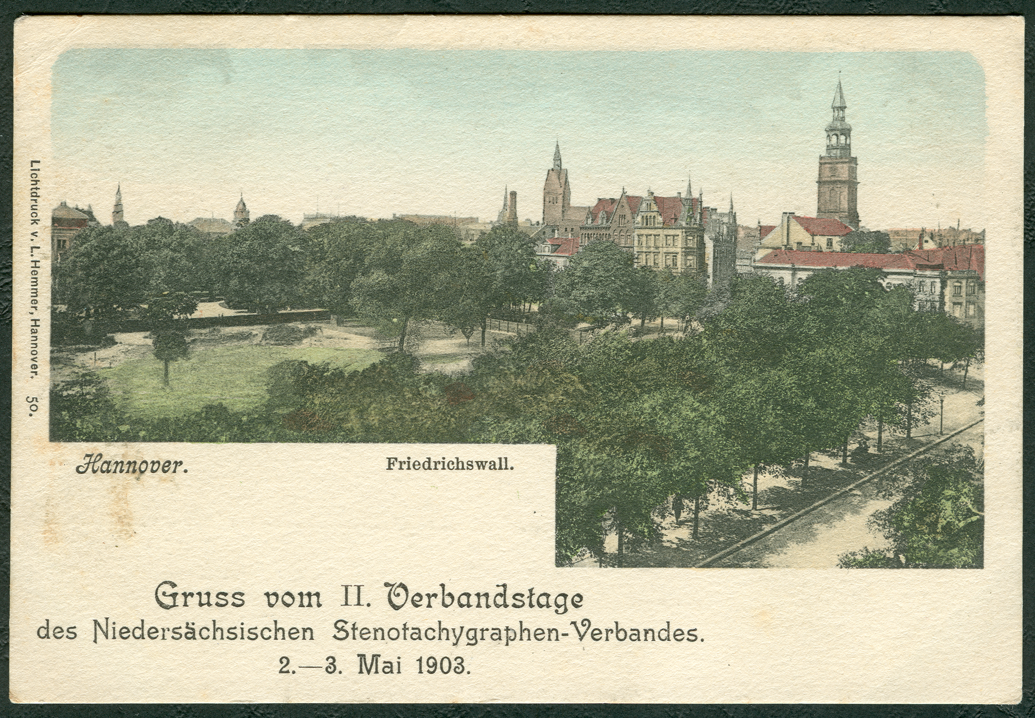 Numerierte und colorierte Ansichtskarte von Ludwig Hemmer mit der Nummer 50, die wohl standardmäßig den Friedrichswall in Hannover zeigte vor dem Bau des Neuen Rathauses. Der Zudruck "Gruss vom II. Verbandstage des Niedersächsischen Stenotachygraphen-Verbandes / 2.-3- Mai 1903" klassifiziert diese Postkarte in die Reihe der sogenannten "Ereignis-" oder "Erinnerungskarten".